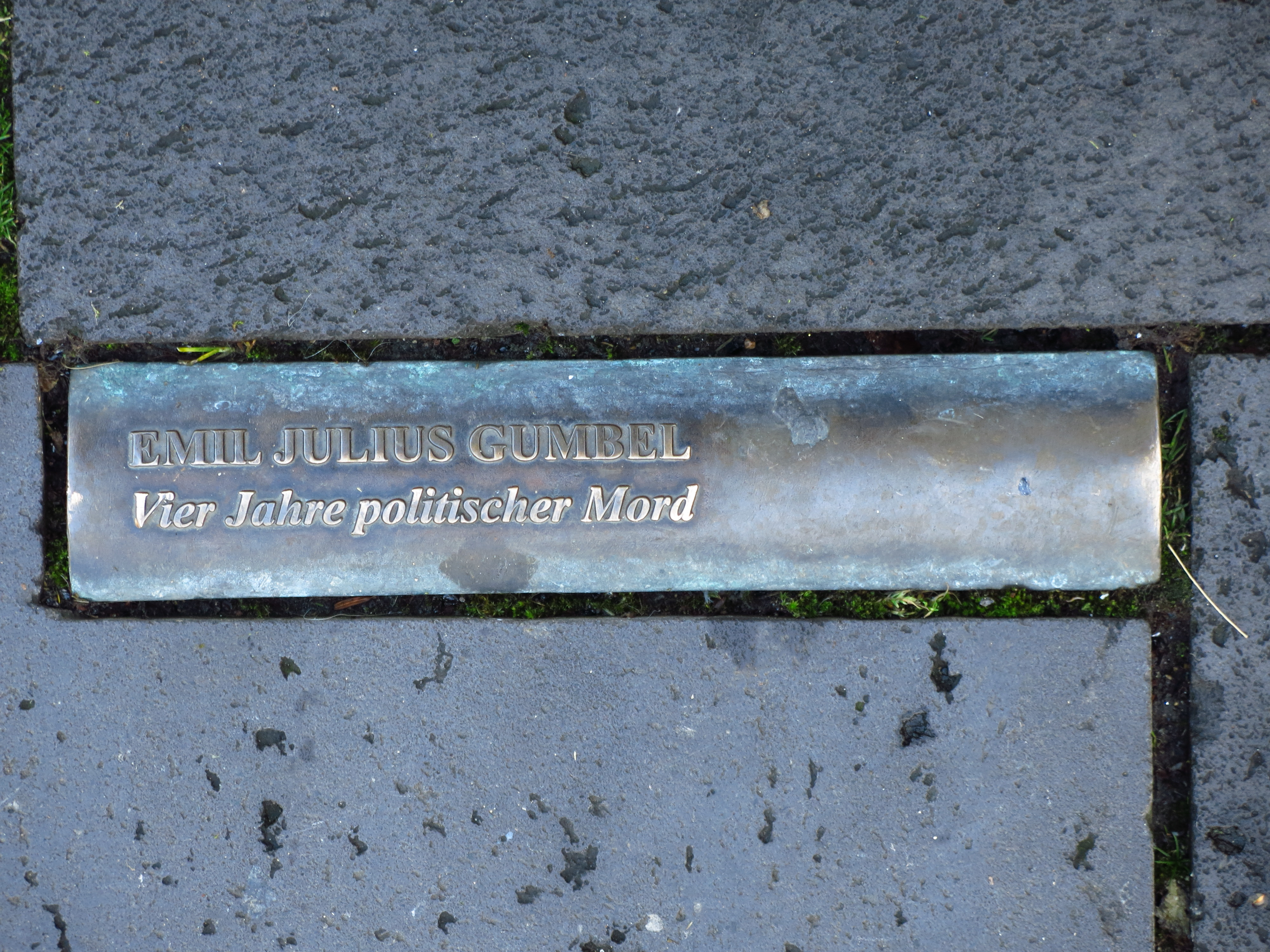 Das Mahnmal zur Bücherverbrennung auf dem Bonner Markt; In das Pflaster des Bonner Markt sind insgesamt 60 sichtbare Buchrücken, sogenannte „Lesezeichen“, verteilt, die sich an der Rathaustreppe, dem Ort an dem die Bücher am 10. Mai 1933 verbrannt wurden, verdichten. Zusätzlich wurde ein wetterfester Archiv-Behälter in Form einer Büchertruhe in den Platz eingelassen. Seine Inschrift benennt das Ereignis und weitere Autoren von verbrannten Büchern.